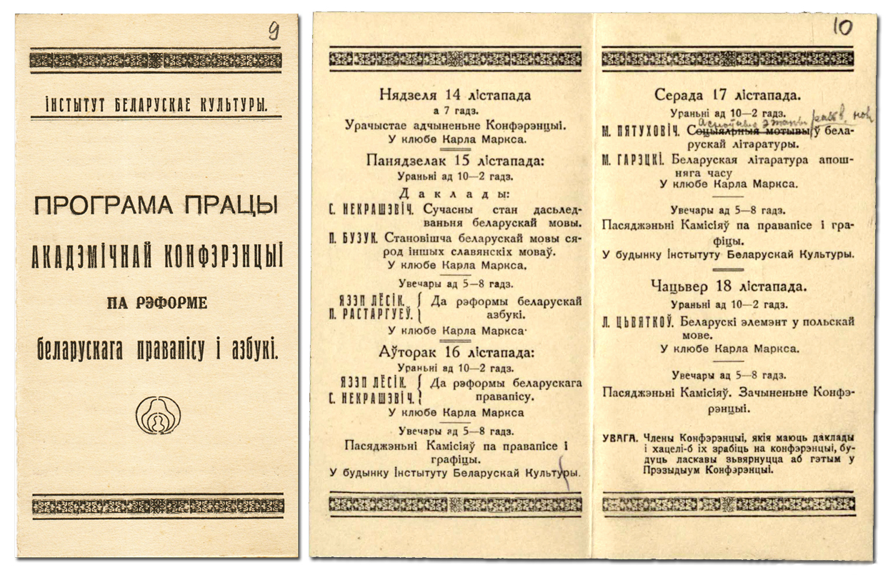 Беларуская (тарашкевіца): Праграма Акадэмічнае канфэрэнцыі па рэформе беларускага правапісу і азбукі 1926 году